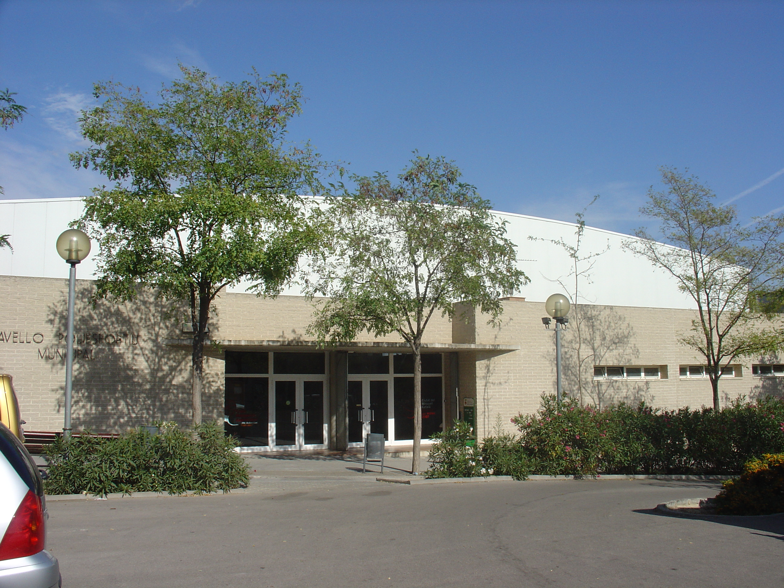 Pavelló Puigverd, Castellar del Vallès, Spain